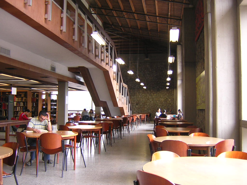 Interior Biblioteca Central, Universidad de Antioquia, Medellín, Colombia (esta foto la tome yo, y la libero al dominio público)